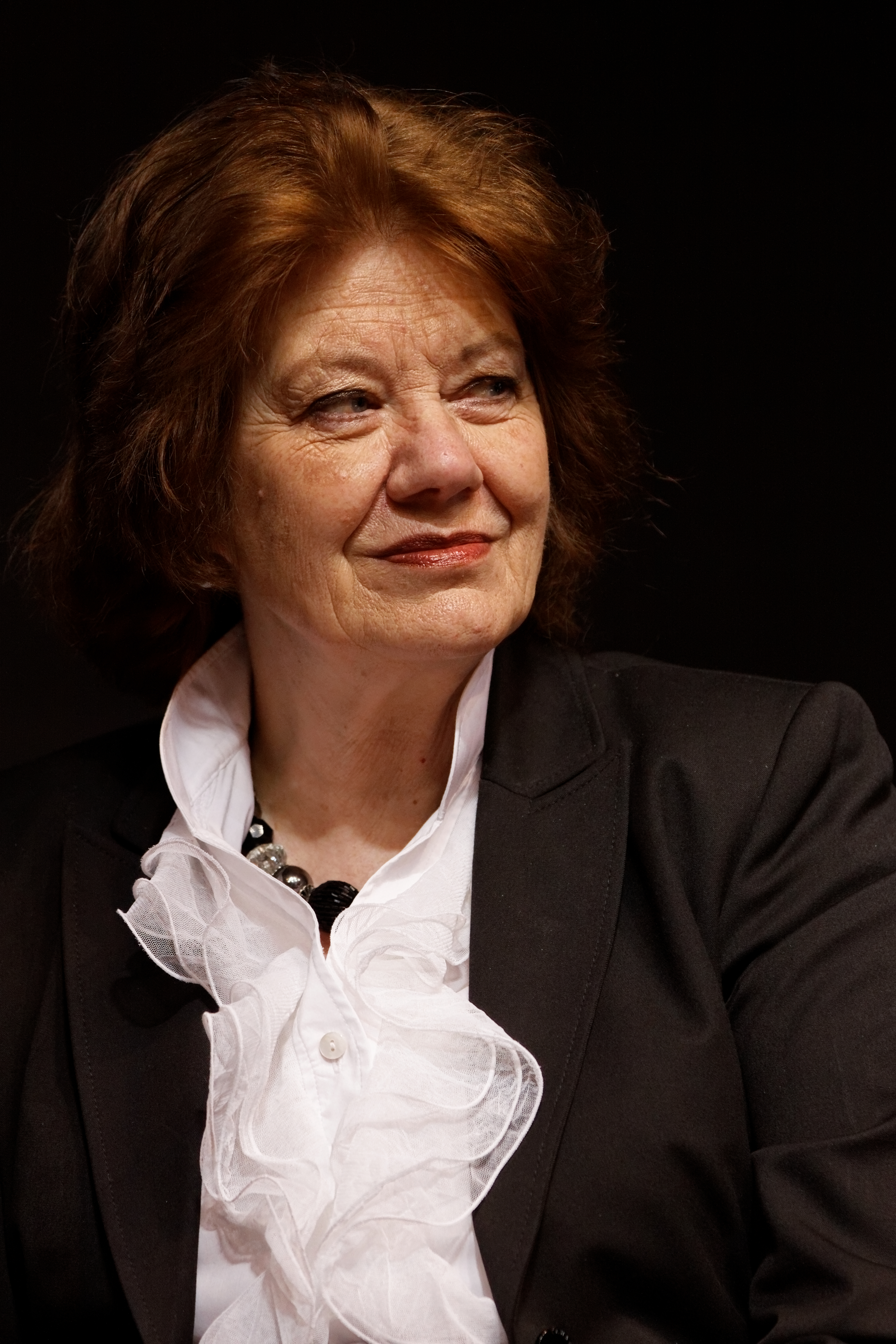 Anne Perry en conférence au salon du livre de Paris 2012.